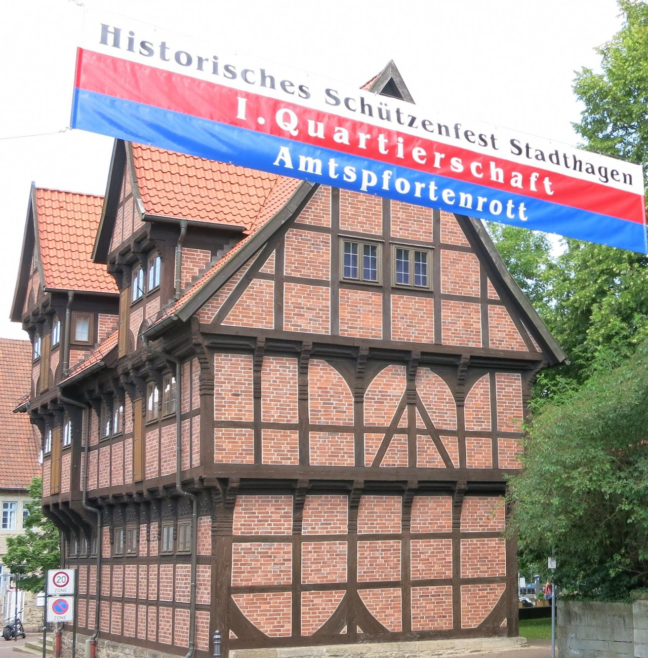 Die Amtspforte in Stadthagen heute!